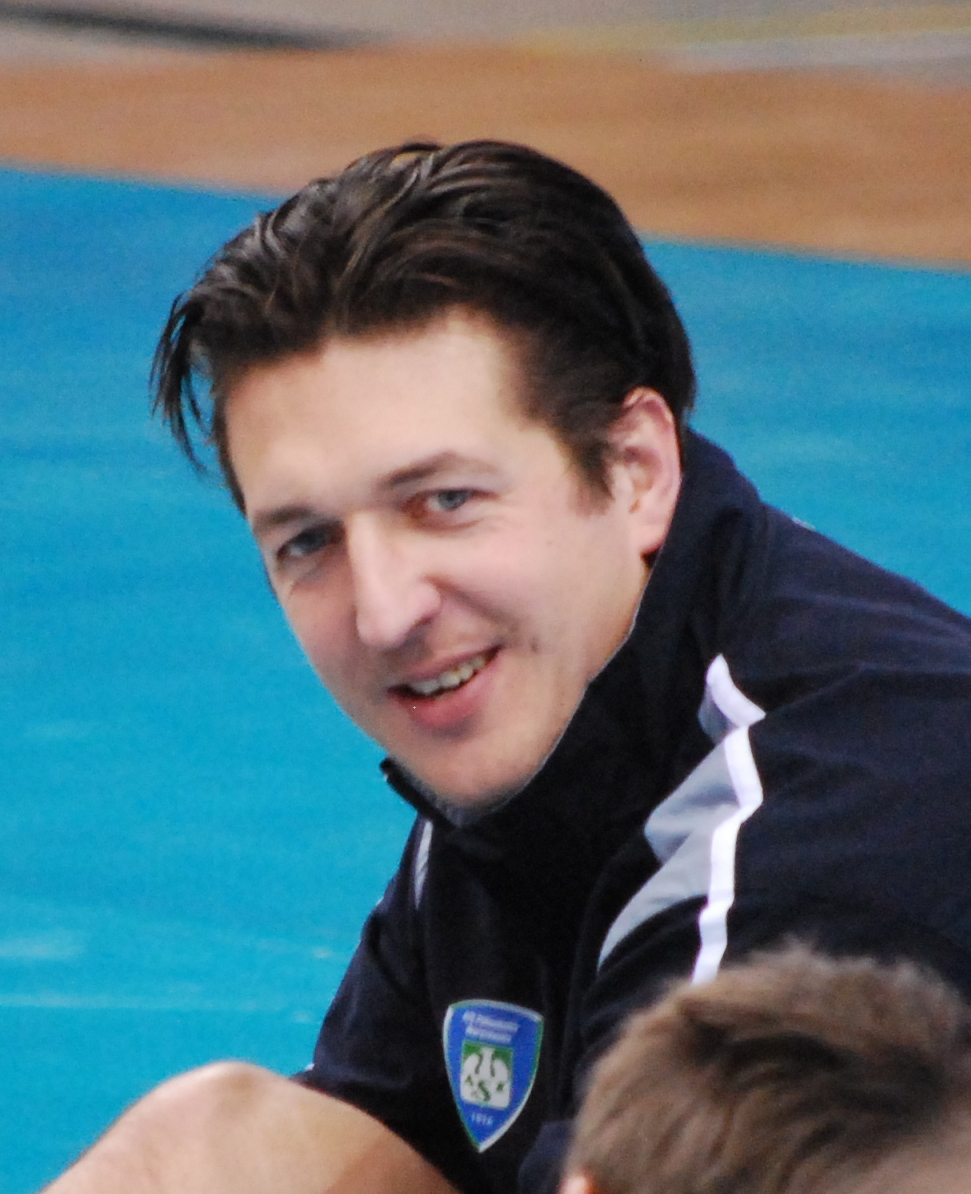 Marcin Nowak - siatkarz.